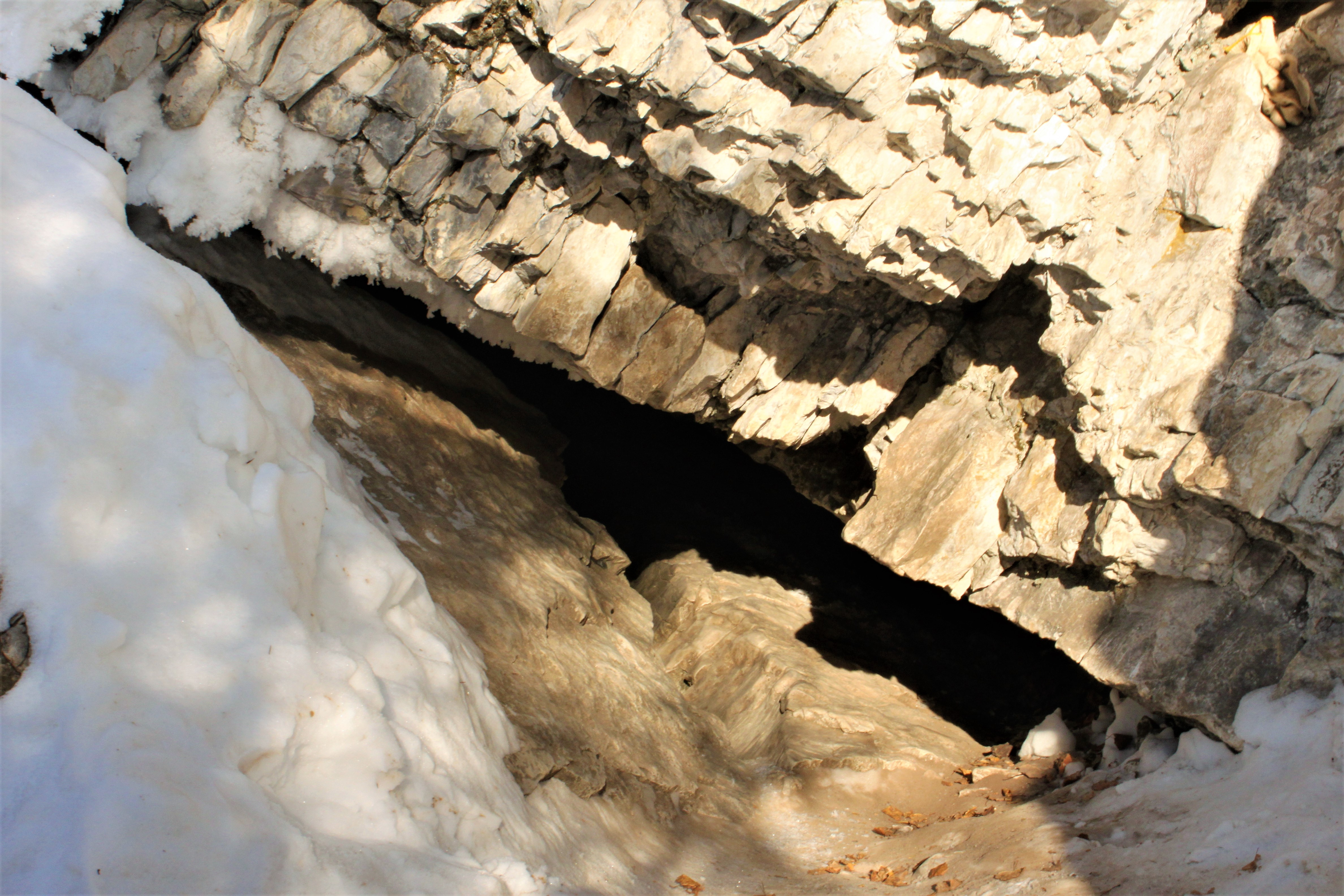 Вход в пещеру Чудесницу